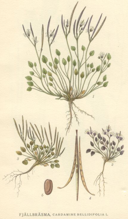 Cardamine bellidifolia